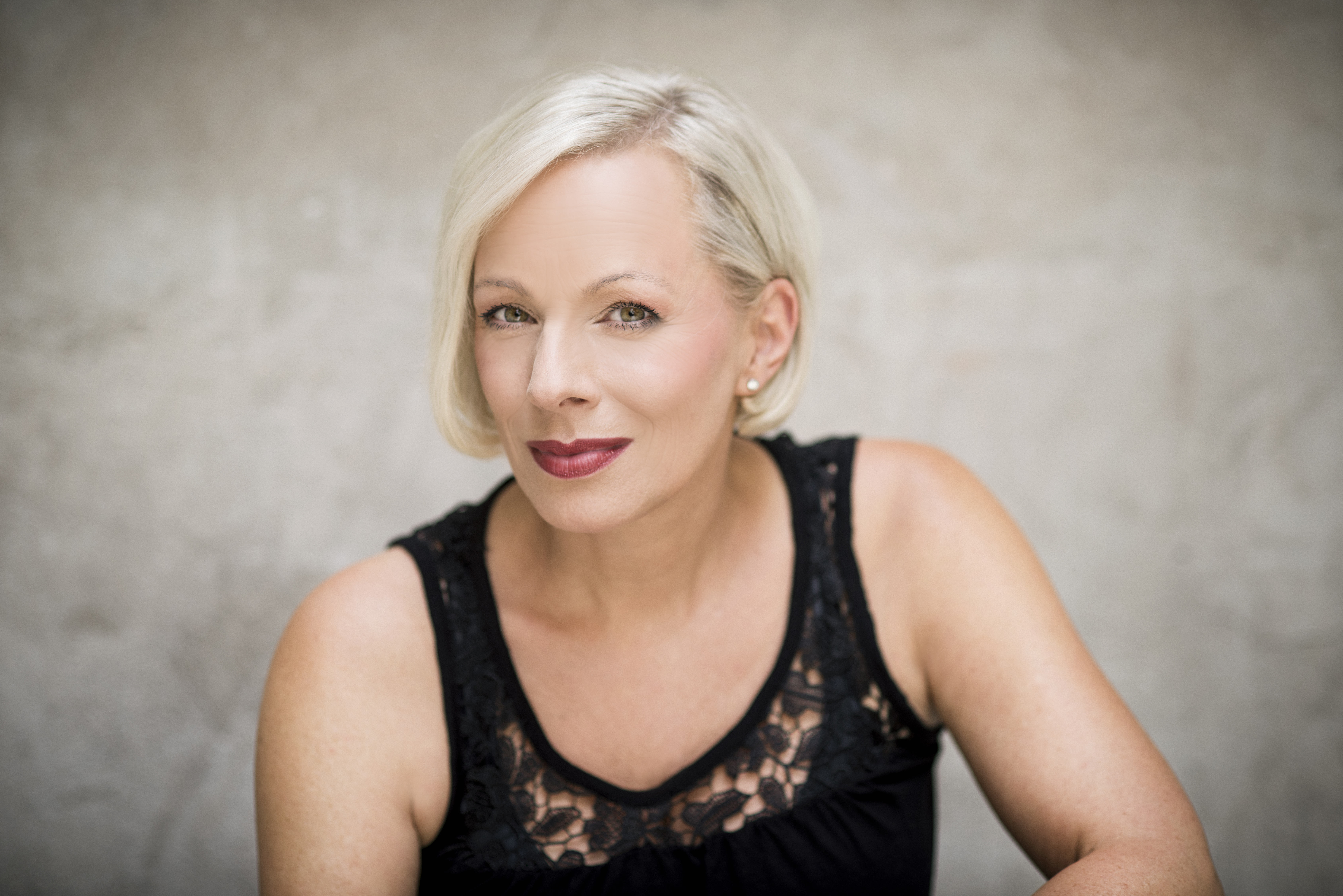 Foto: Bernd Brudert 2016